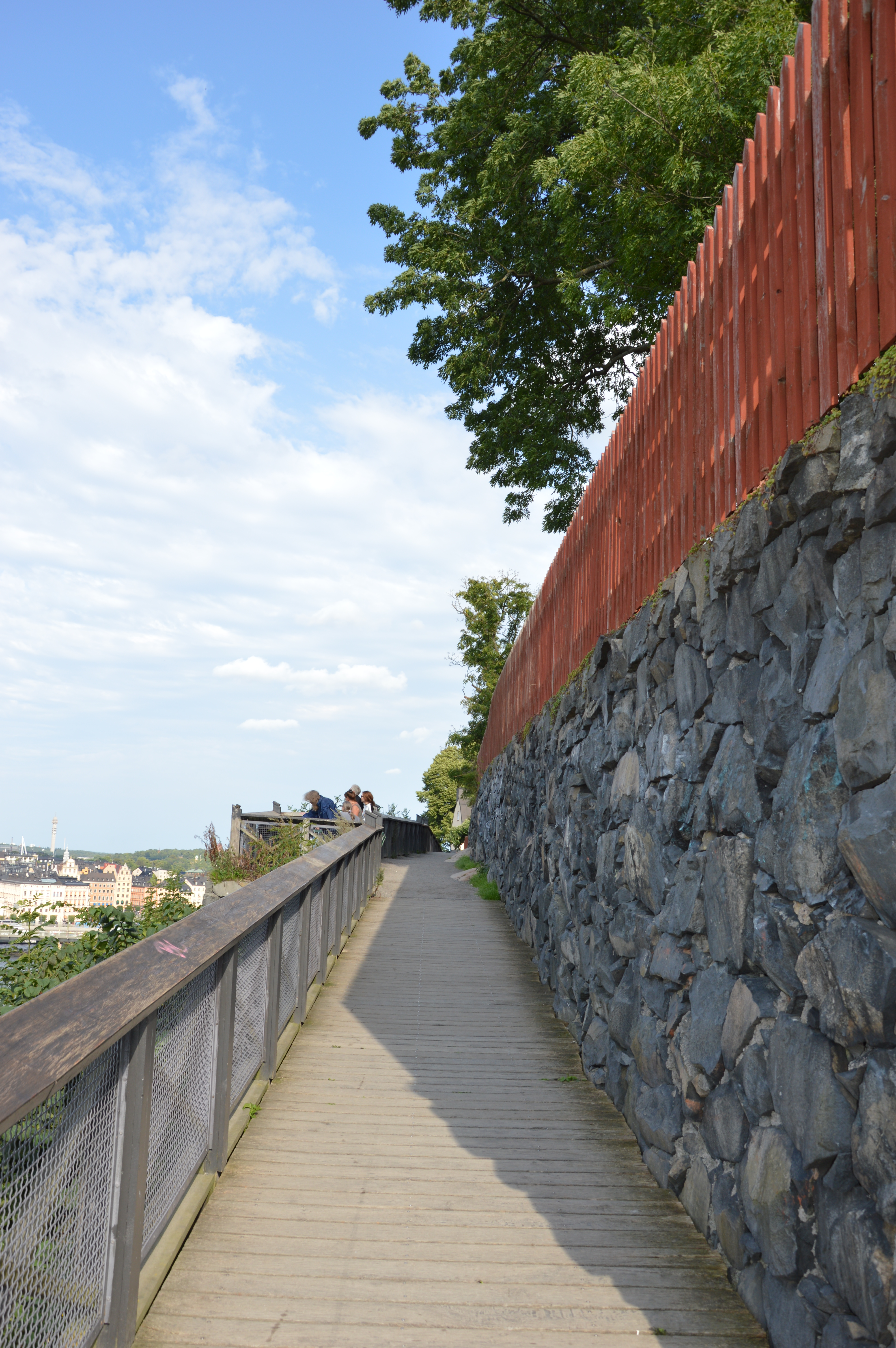 Monteliusvägen